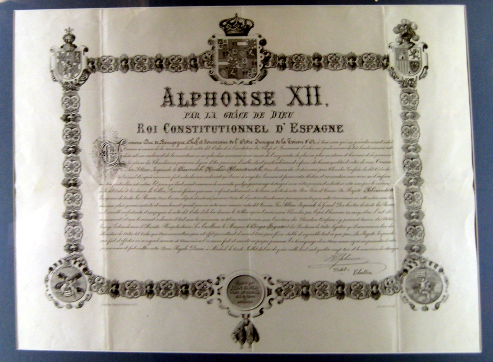 Грамота о награждении орденом золотого руна наследника великого князя николая александровича королем испанским альфонсом XII 3 июля 1885 года. Государственный архив российской федерации